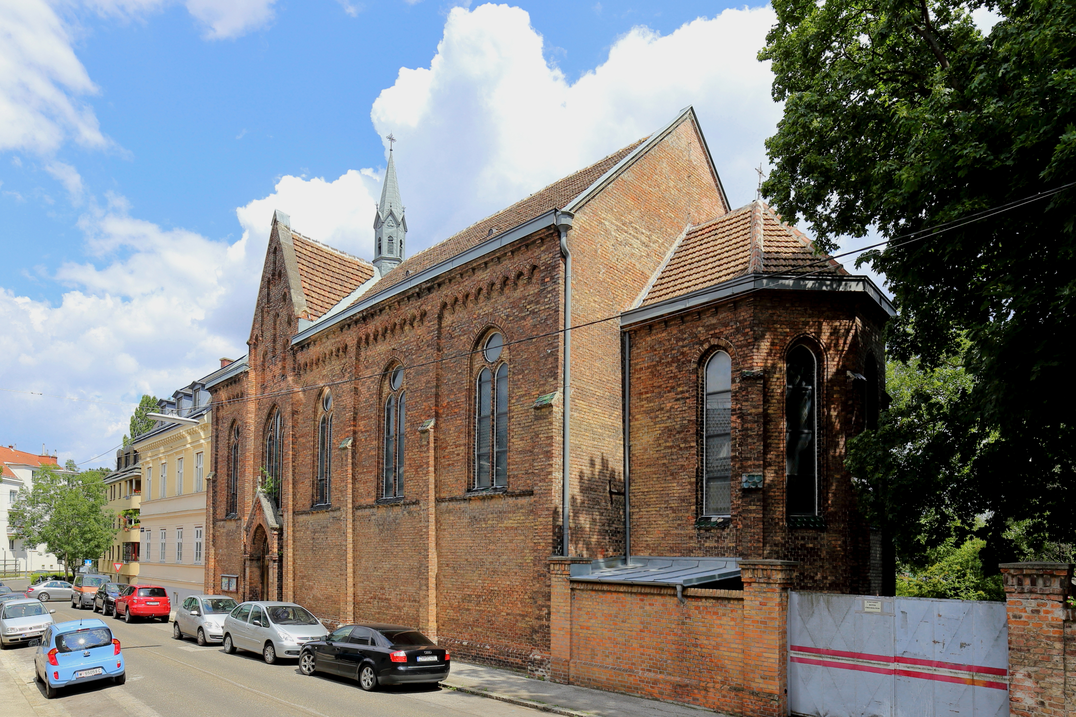 Die Klosterkirche des Marianneum in Hetzendorf, ein Bezirksteil des 12. Wiener Gemeindebezirkes Meidling.Die im neugotischen Stil als Rohziegelbau konzipiert Kirche wurde nach Ideen von Friedrich Schmidt durch Architekt und Stadtbaumeister Ludwig Zatzka von 1886 bis 1888 für die „Schwestern vom heiligen Vinzenz von Paul“ errichtet.